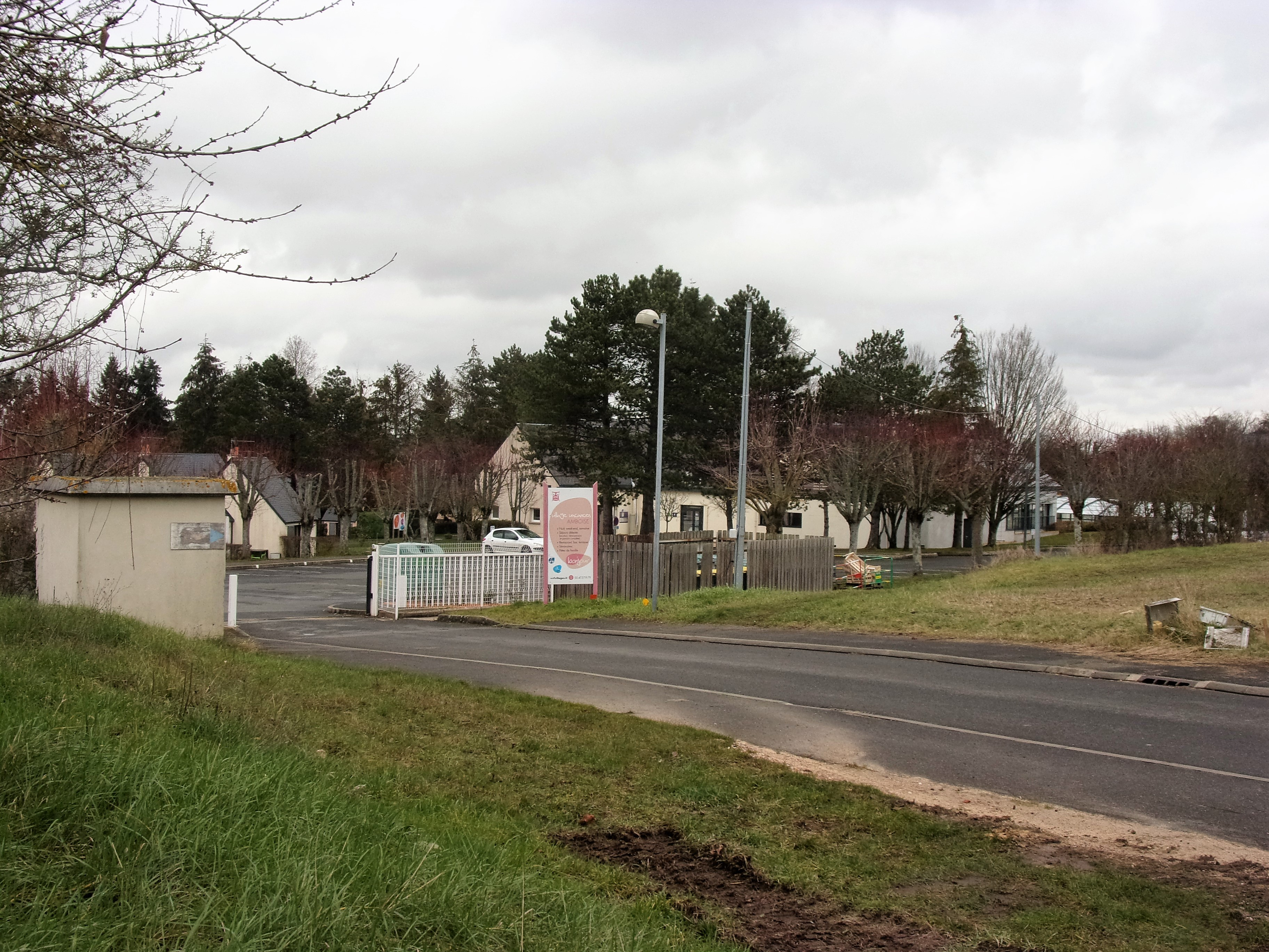 Amboise - entrée du Village Vacances des Châteliers